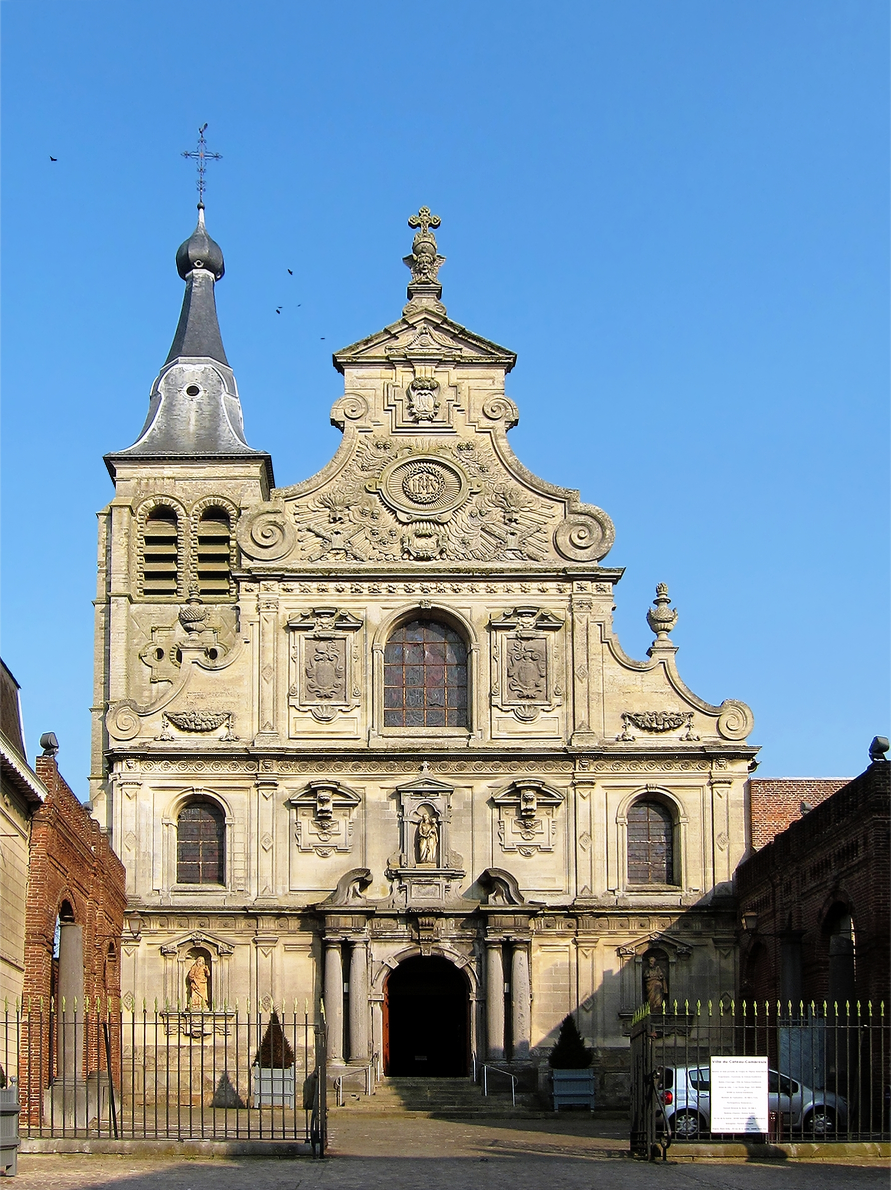 La façade de la collégiale Saint-Martin au Cateau-Cambrésis.